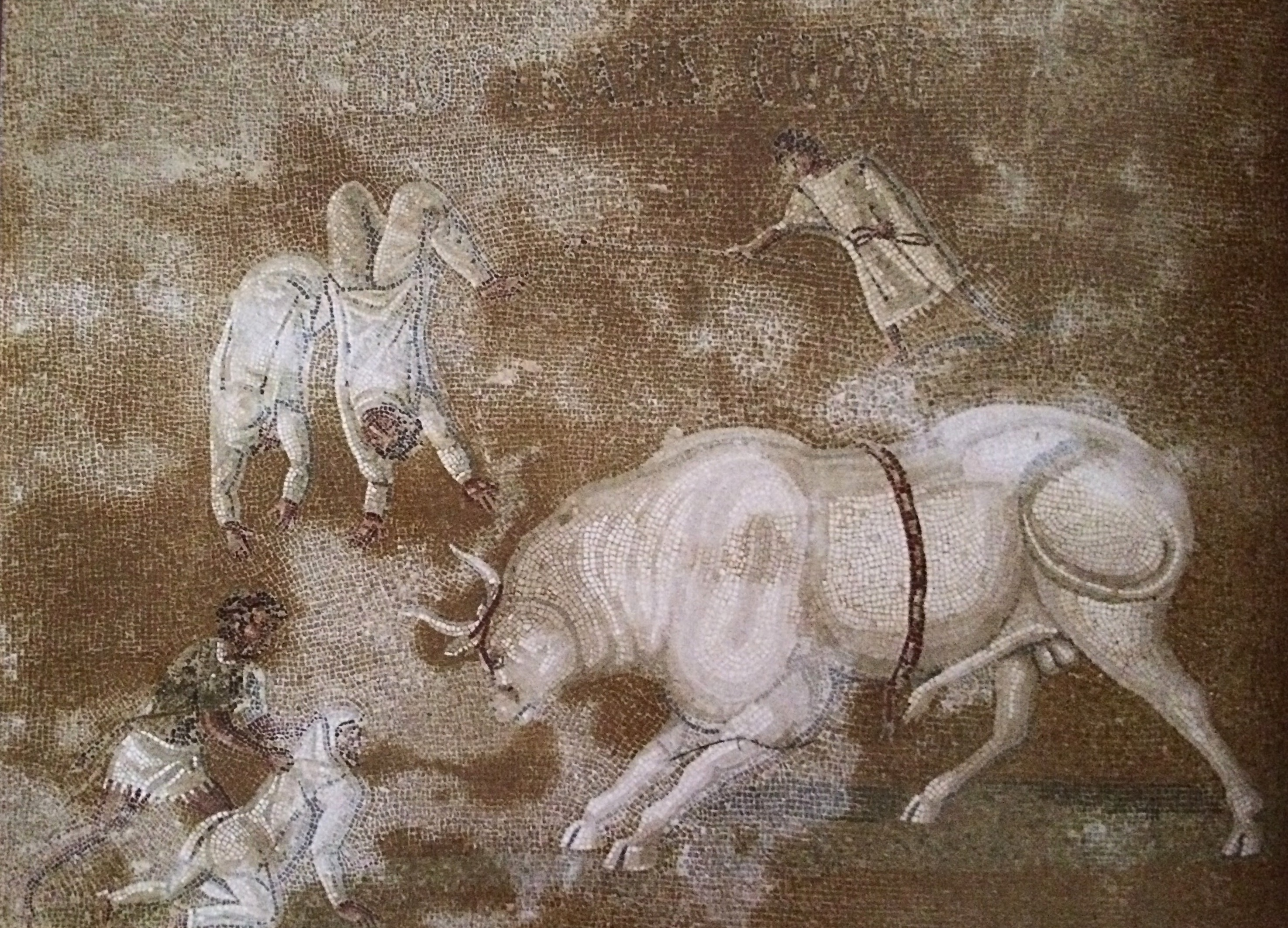 "Бык и его жертвы". Мозаик середины II века